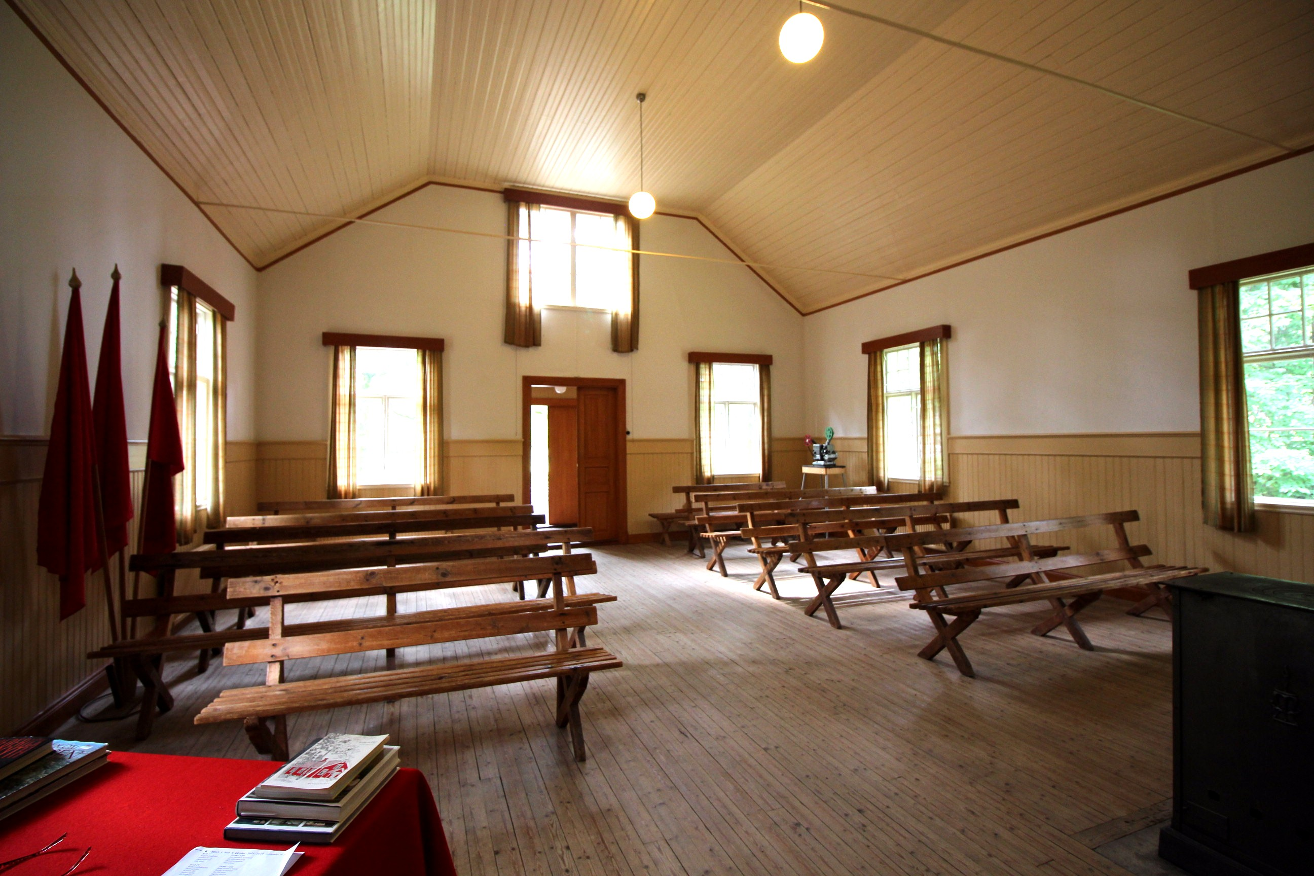 Samlingssal, folkets hus på Skansen, Stockholm